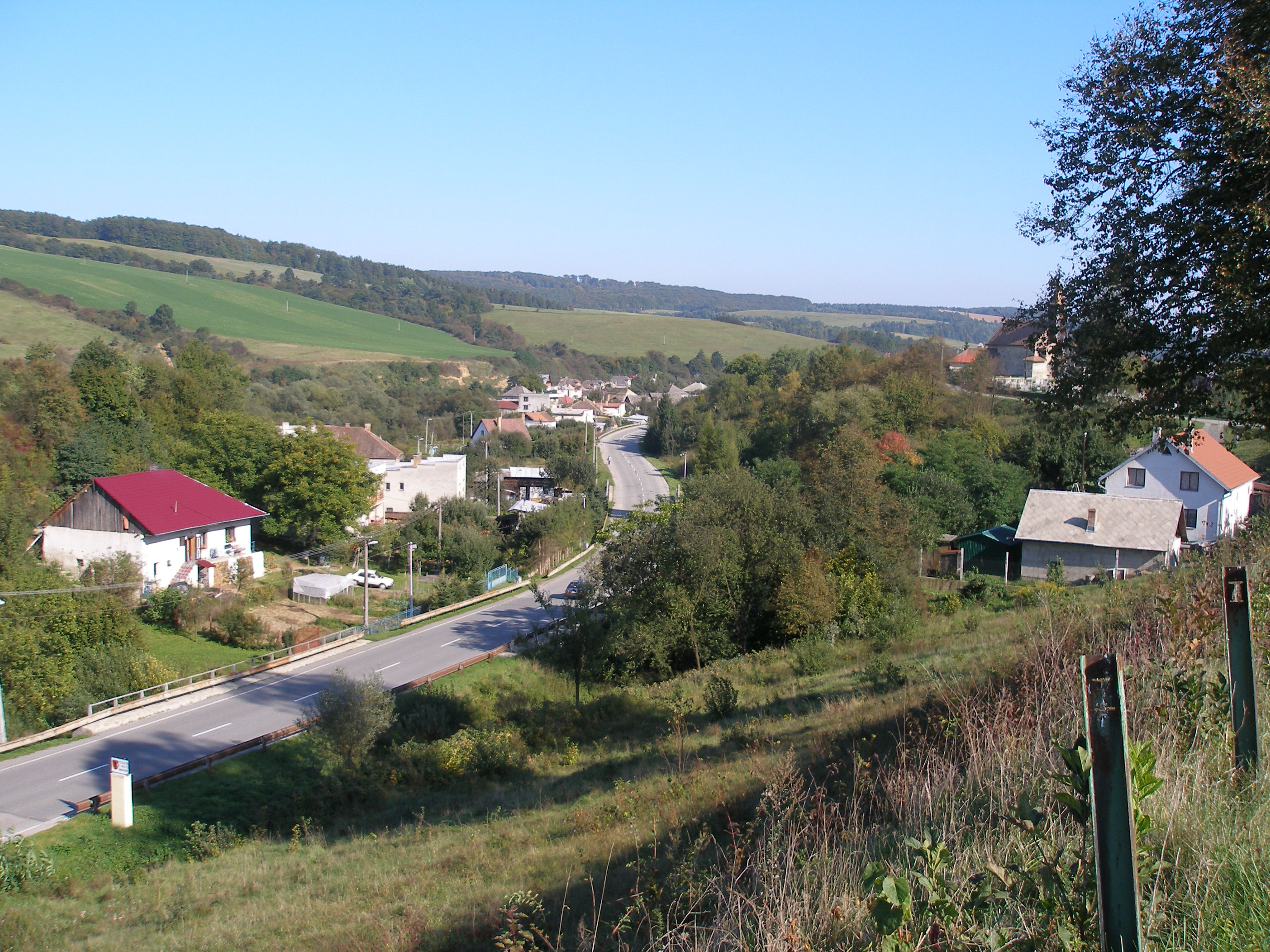 Obec Rokycany okres Prešov, región Šariš